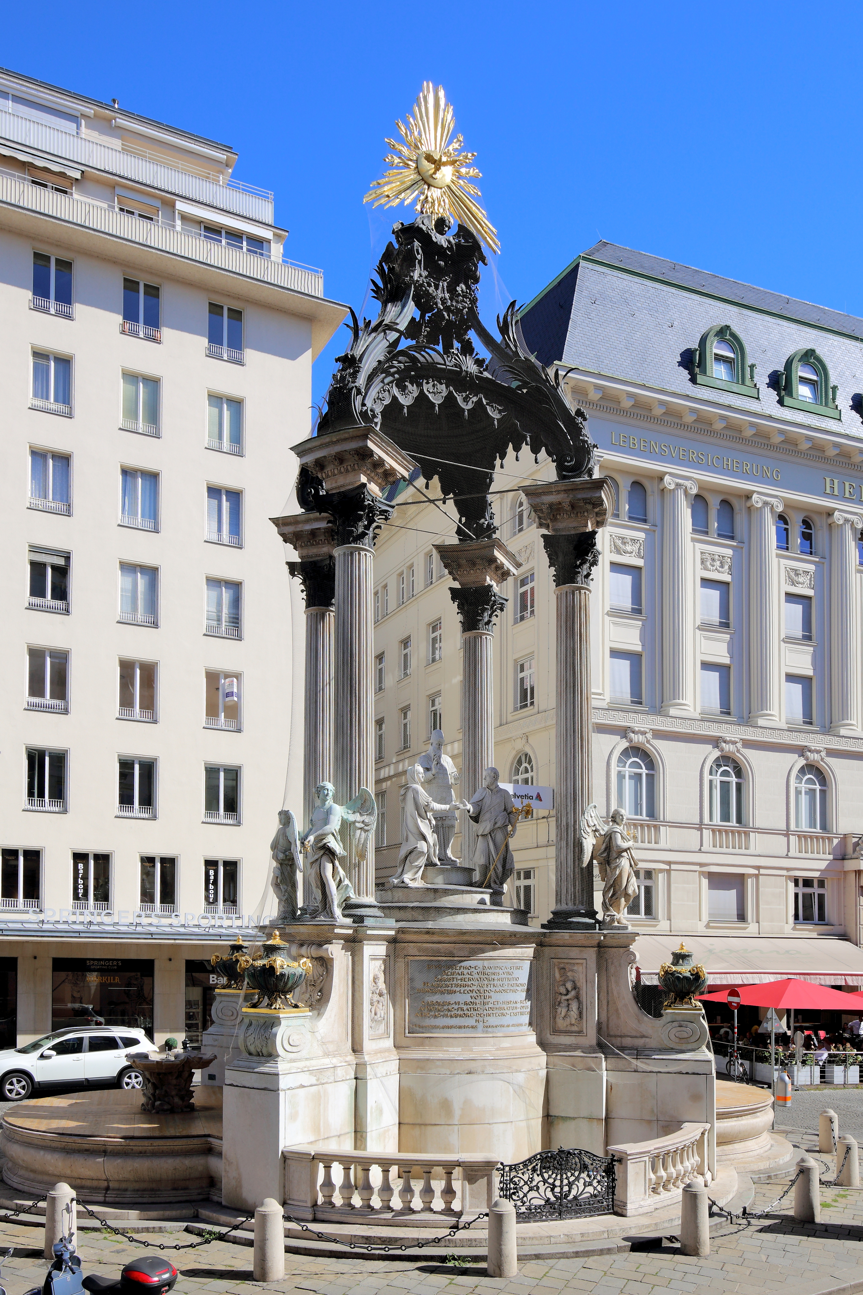 Der Vermählungsbrunnen (benannt nach der dargestellten Vermählunggruppe Maria und Josef mit dem Hohepriester) am Hohen Markt im 1. Wiener Gemeindebezirk Innere Stadt.Ursprünglich wurde das Votivdenkmal im Jahr 1707 von Kaiser Josef I. nach einem Gelübde des Kaisers Leopold I. und nach Plänen von Johann Bernhard Fischer von Erlach anstelle eines Galgens und Prangers auf dem Hohen Markt errichtet. Der Tempel mit sechs Säulen wurde aus Holz gearbeitet. Nachdem das hölzerne Votivdenkmal sehr desolat war, ließ im Jahr 1725 Kaiser Karl VI. es abtragen und als Ersatz einen barocken, 18,5m hohen Tempel auf vier korinthischen Säulen aus weißem Marmor nach einer Zeichnung von Joseph Emanuel Fischer von Erlach errichten. Die Grundsteinlegung fand am 14. August 1729 statt und die Weihe durch Kardinal Graf Kollonitsch am 14. April 1732. Die Architektur des Denkmals stammt vom Hofsteinmetz Elias Hügel. Die vier Engelfiguren auf den Sockelvorsprüngen und die drei Figuren der Vermählungsgruppe sind ein Werk von Antonio Corradini. Der mit ornamentalen und pflanzlichen Motiven verzierte Bronzebaldachin mit Strahlenkranzbekrönung wurde vom Glockengießer Johann Baptist Divall geschaffen und die beiden Rundbecken mit Springbrunnen wurden von Lorenzo Mattielli gestaltet.